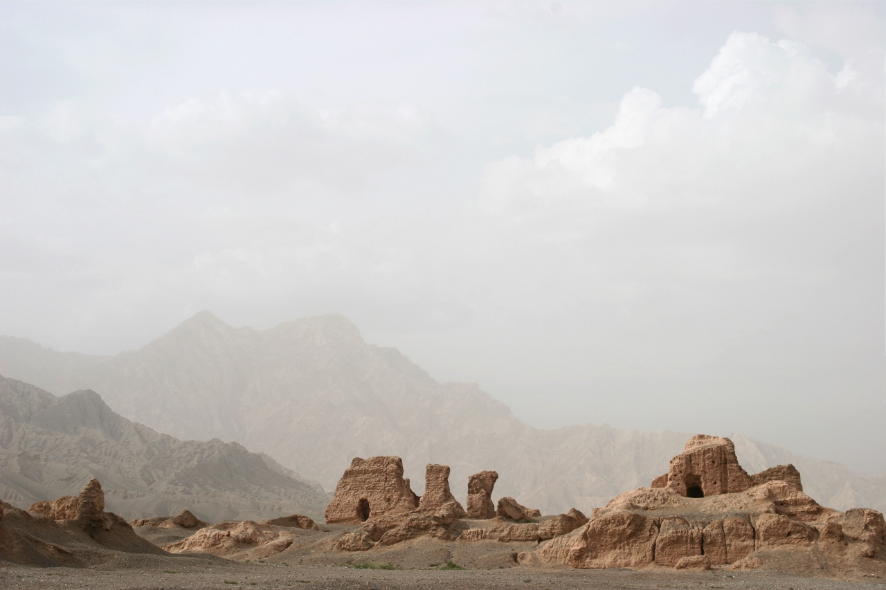 Ruinen von Subashi